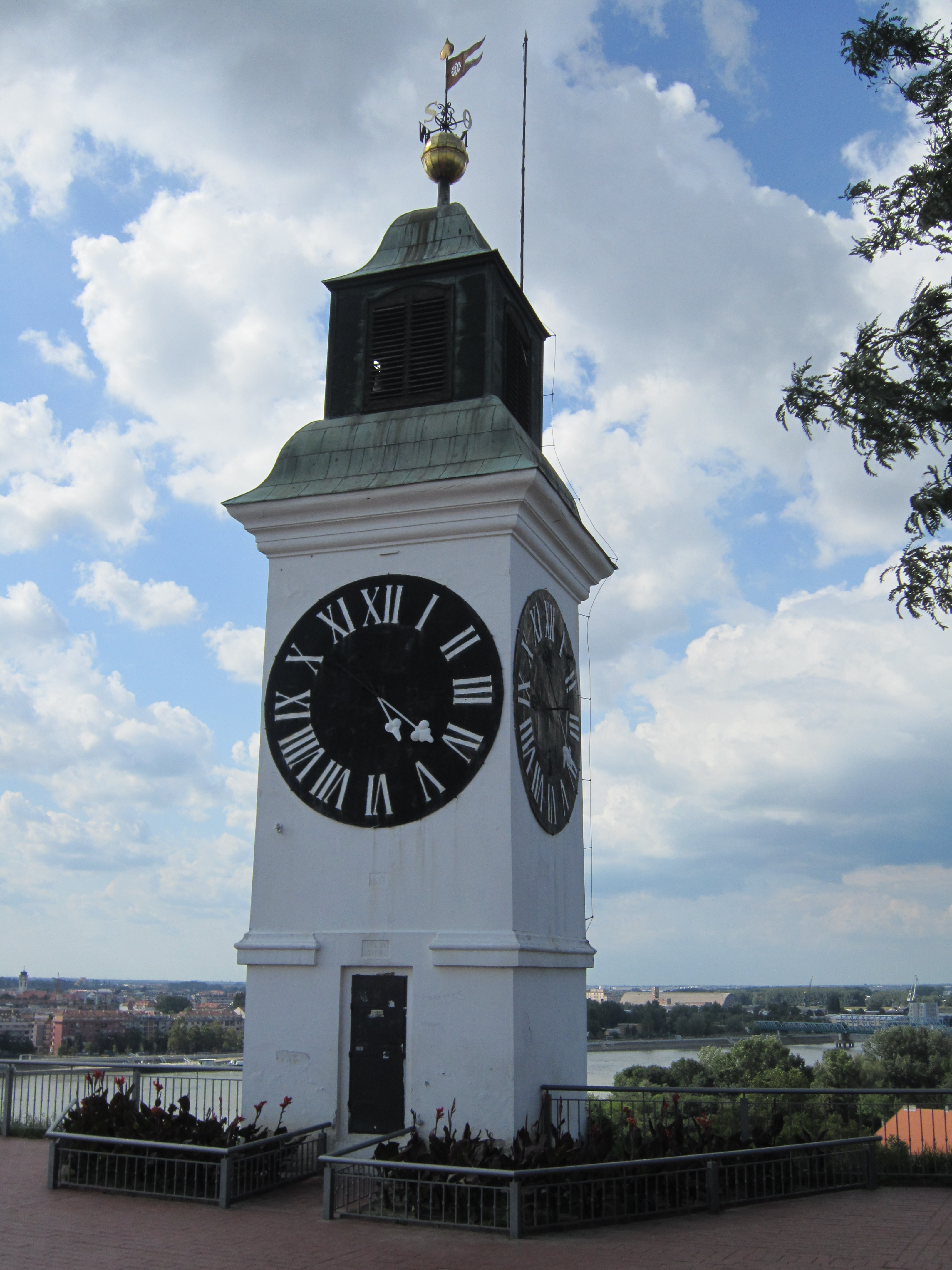 Servië - Petrovaradin - klokkentoren